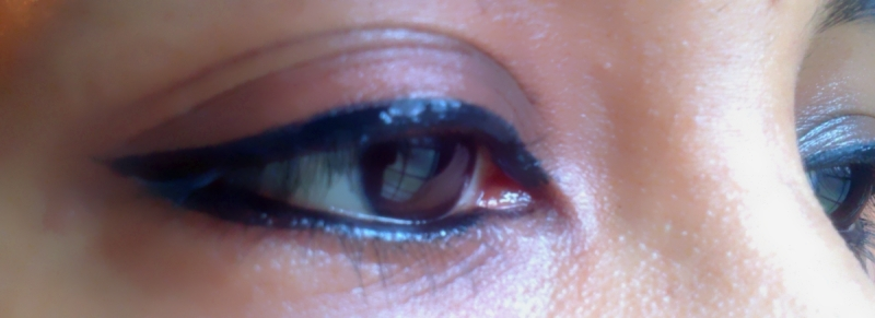 കണ്മഷി എഴുതിയ കണ്ണ്